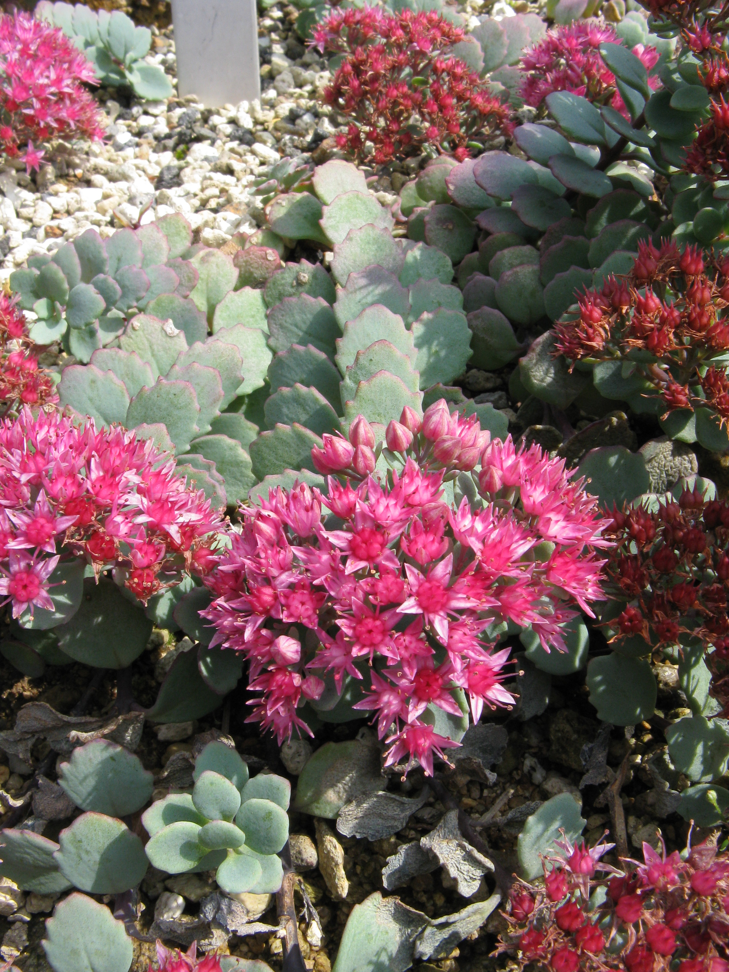 Scientific name Hylotelephium cauticola